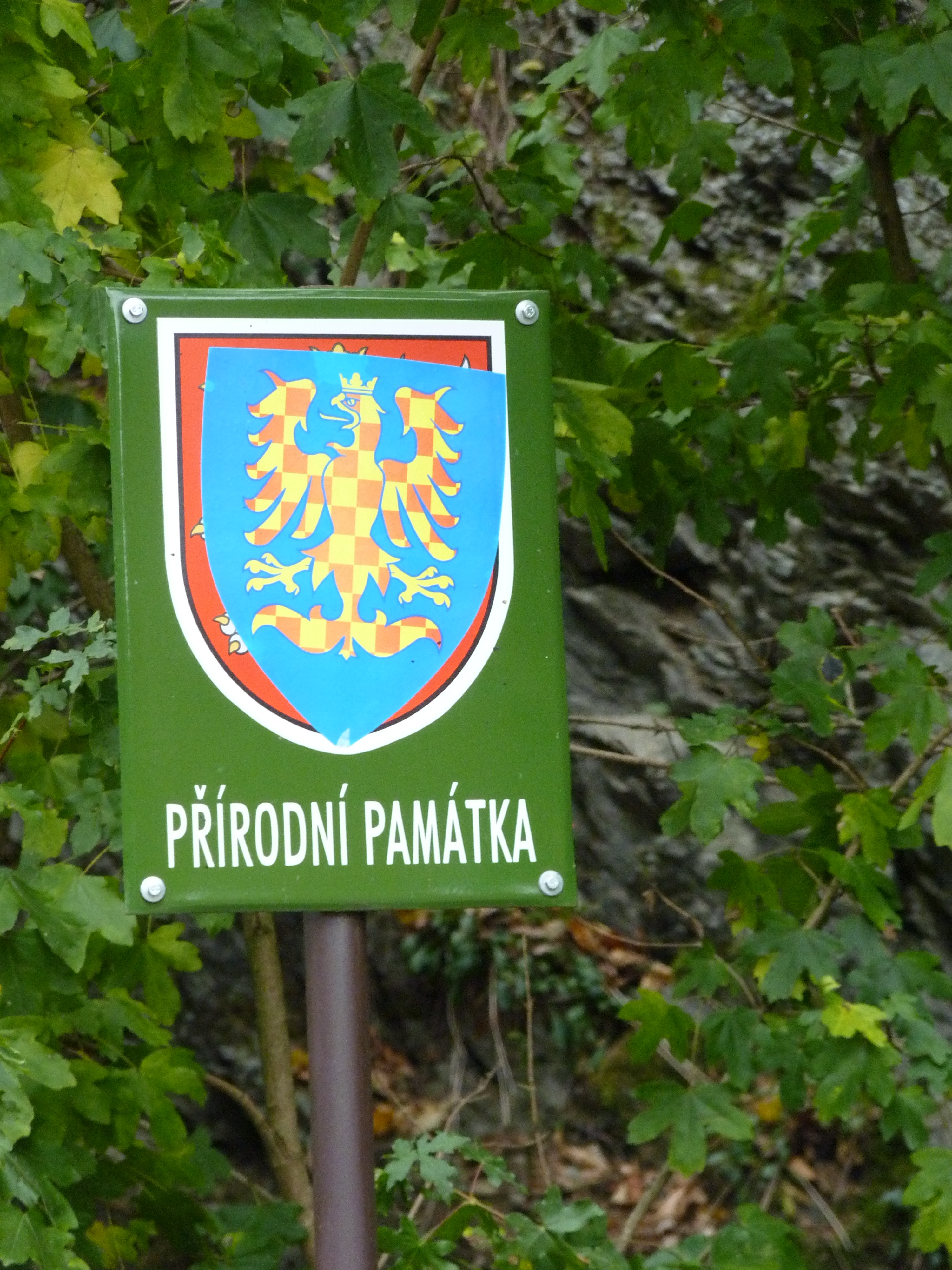 Cedule přírodní památky Kůlny, na níž byl český lev nelegálně přelepen nálepkou moravské orlice.